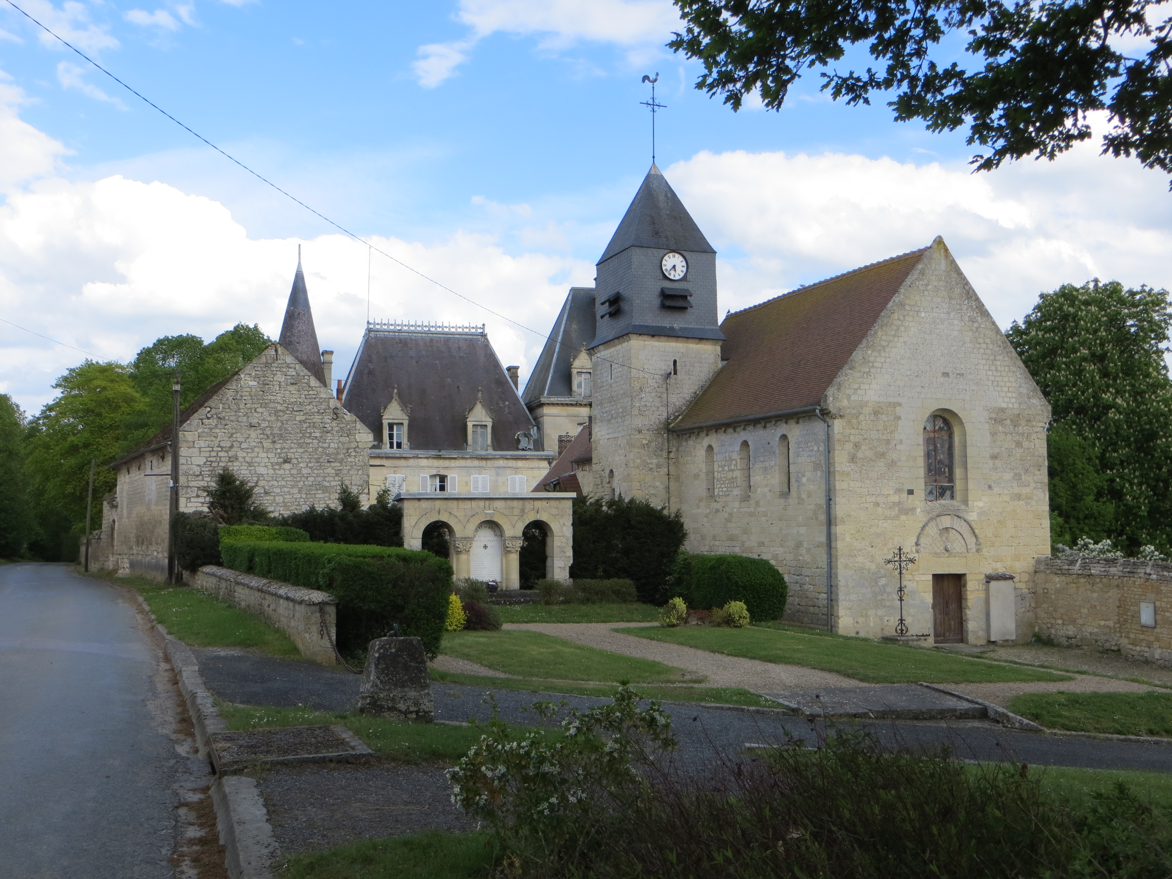 Vue générale de l'église et du château